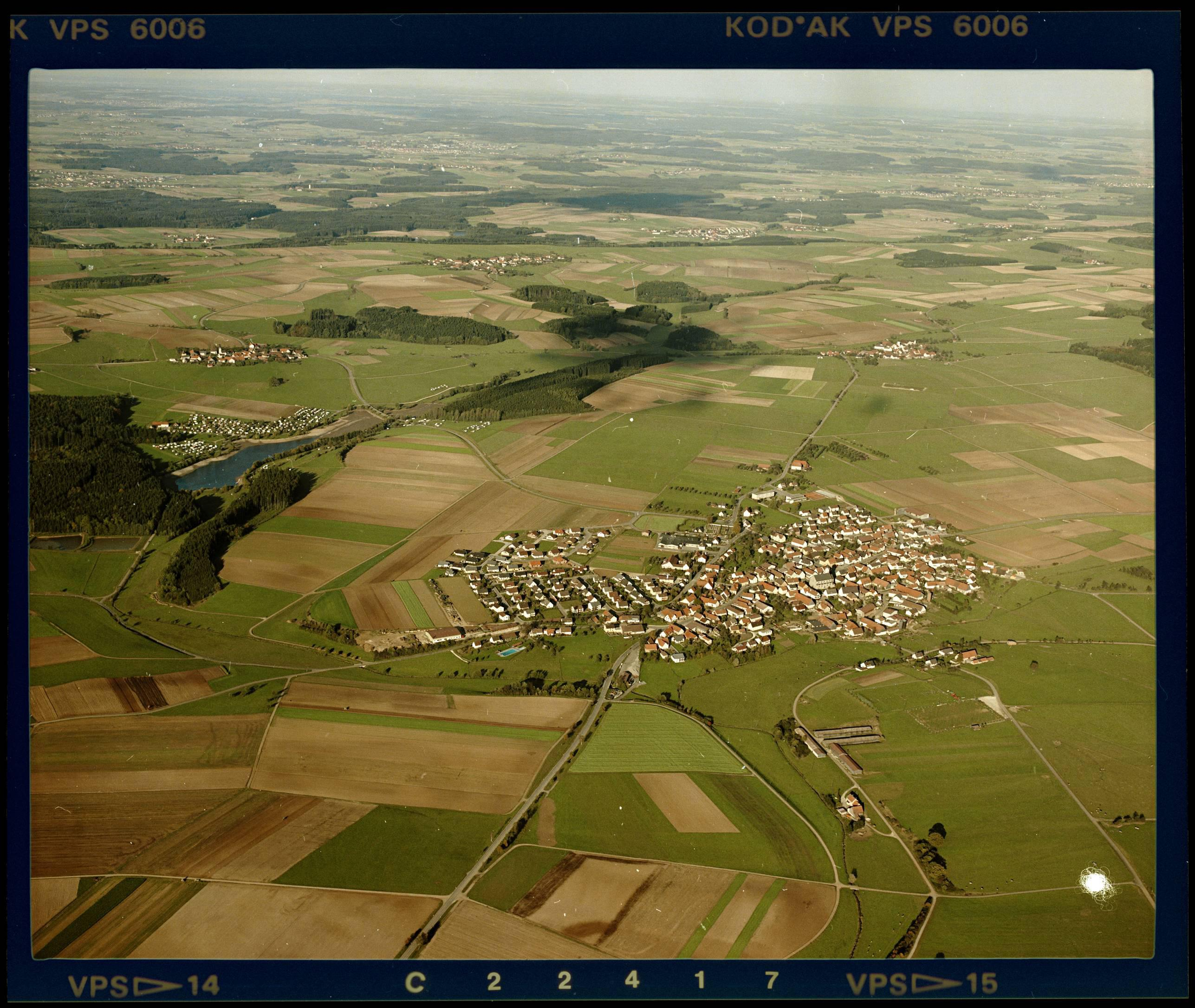 Luftbild von Pfahlheim - Staatsarchiv Sigmaringen - Archivalieneinheit N 1/96 T 1 Nr. 600